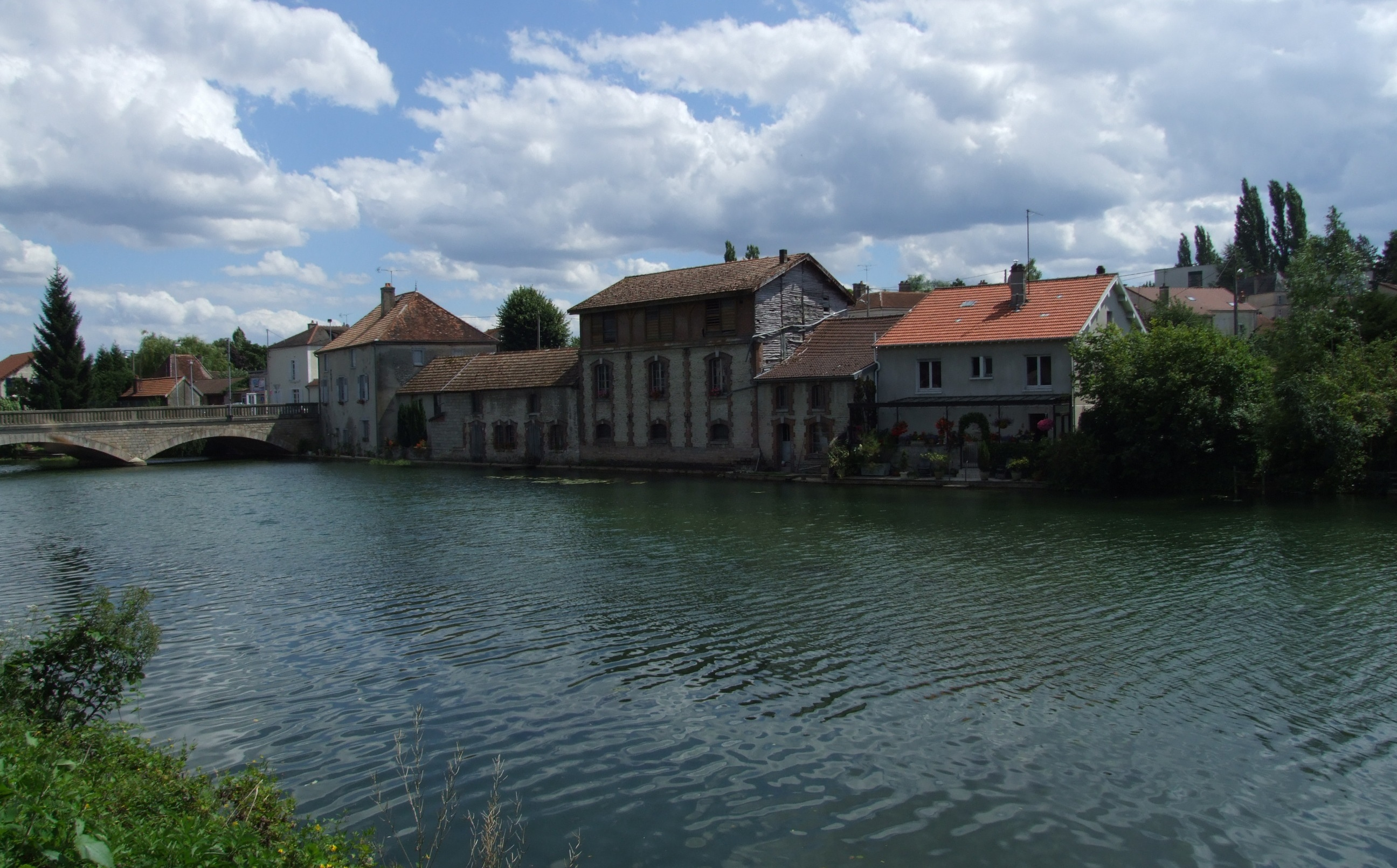 Bar-sur-Aube, Aube, Champagne-Ardennes, FRANCE